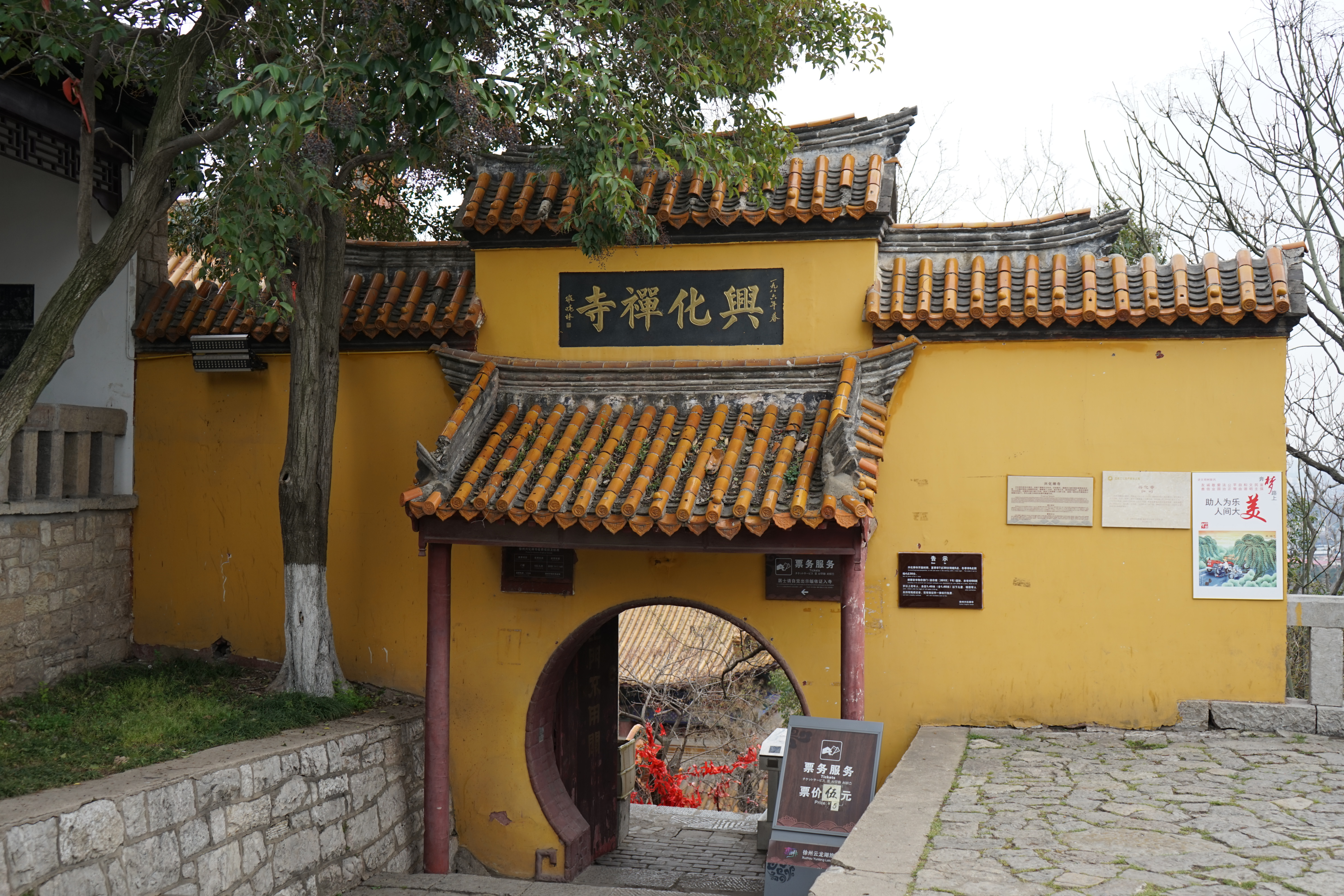 云龙山 兴化寺